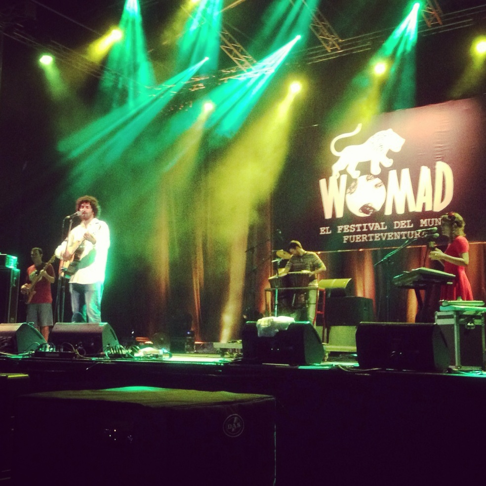 Maldito Ramirez WOMAD